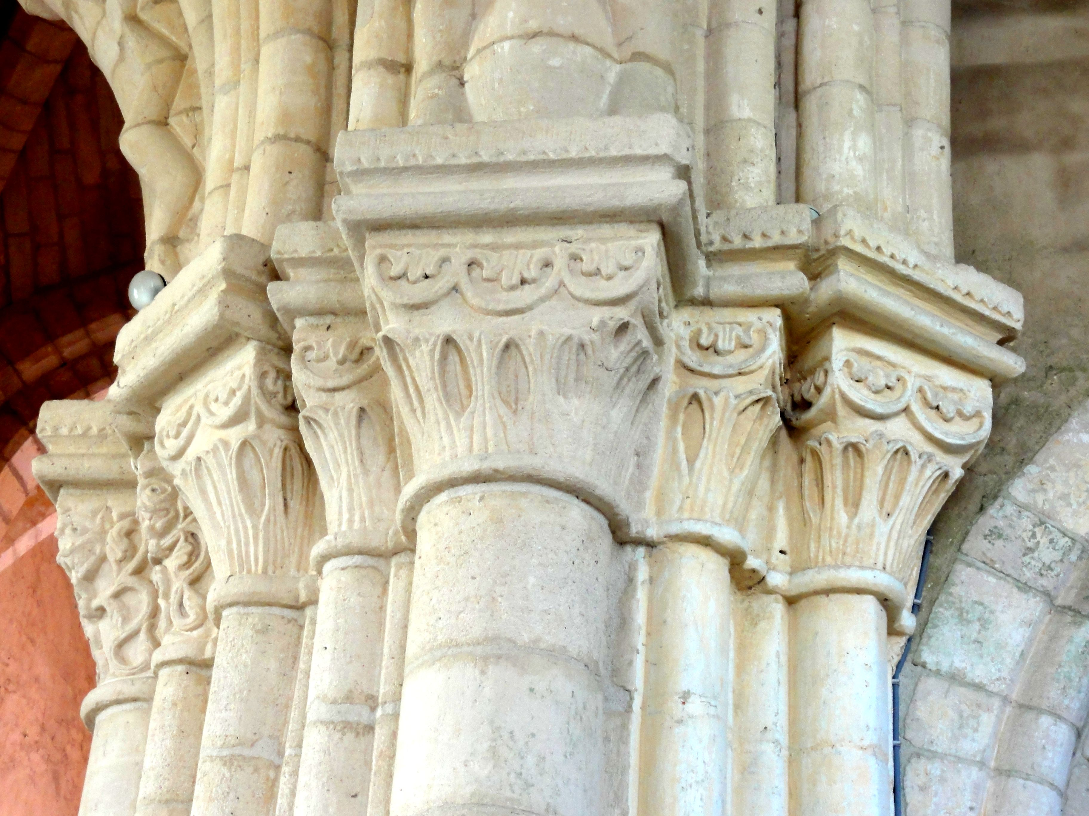 Croisillon nord, arcade vers la croisée, chapiteaux côté ouest (pile NO de la croisée).